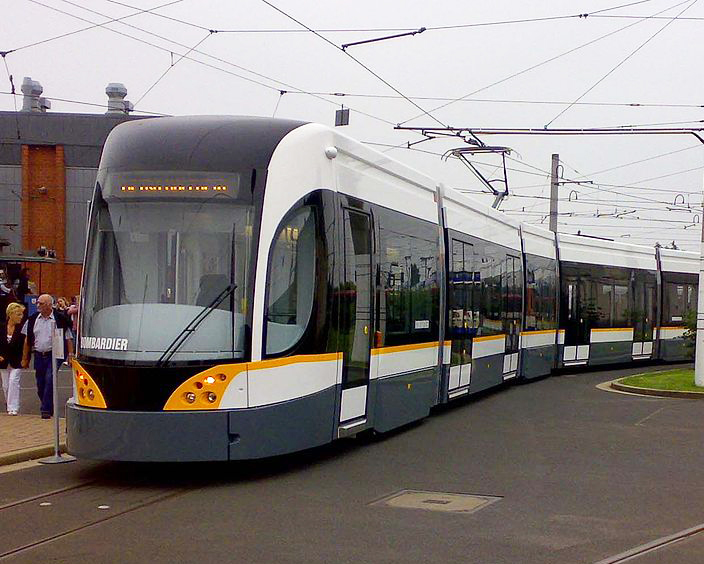 Straßenbahn (Bombardier) aus Valencia zu Besuch in Krefeld